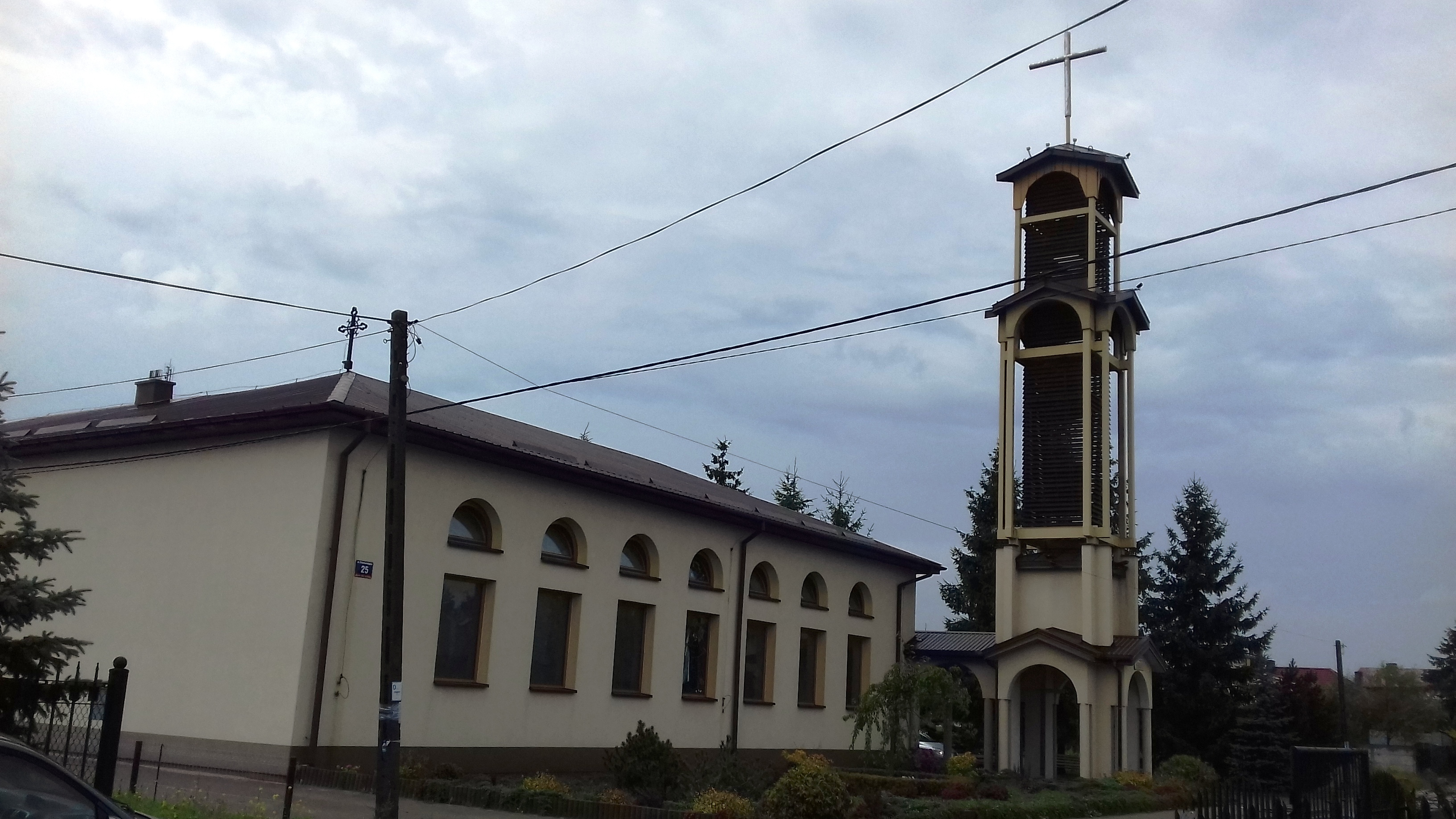 Sękocin Stary (gm. Raszyn, pow. Pruszków) - kościół Św. Faustyny Kowalskiej